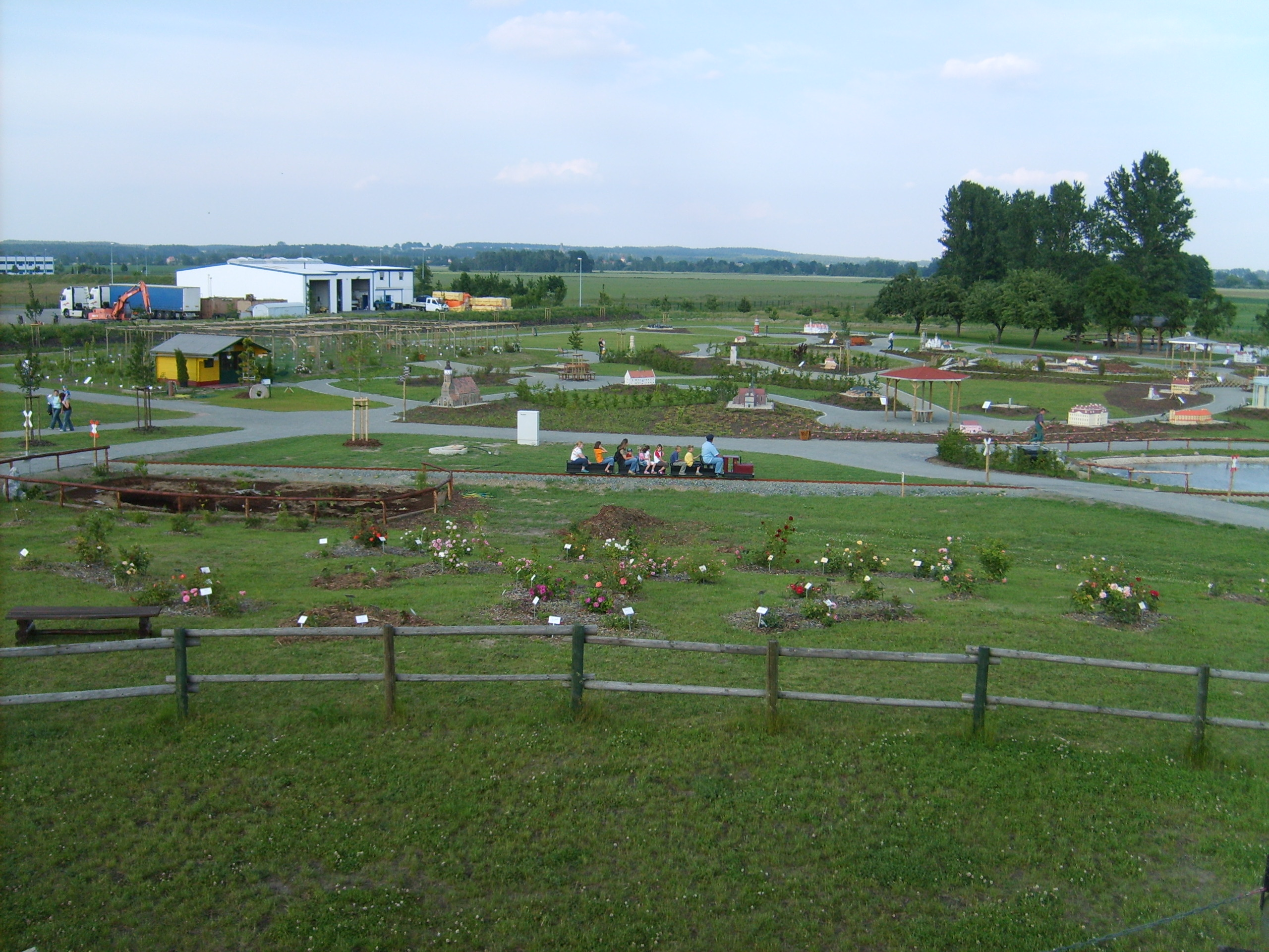 Miniaturenpark Elsterwerda